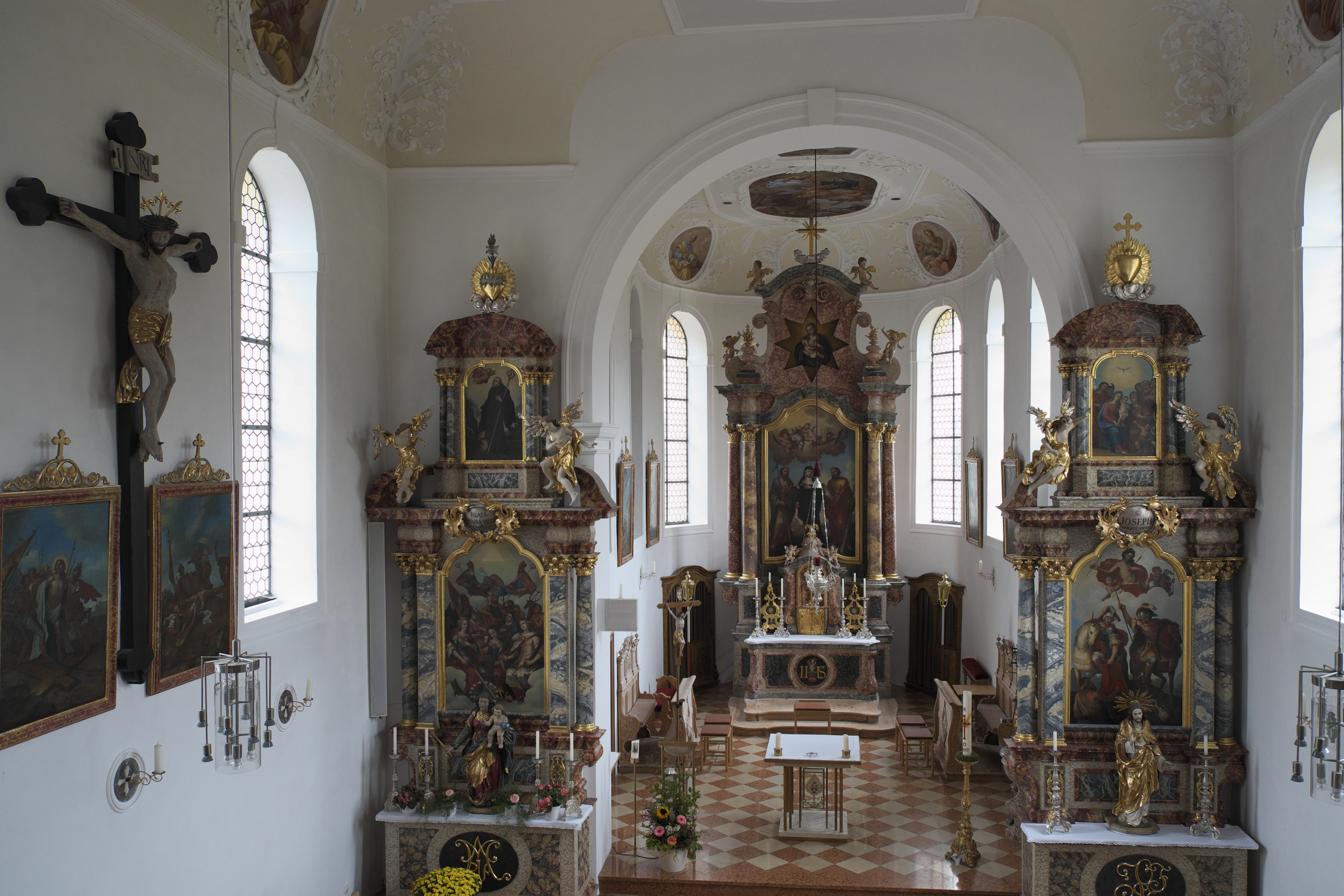 Katholische Pfarrkirche St. Walburga in Weißensee (Füssen) im Landkreis Ostallgäu (Bayern/Deutschland), Innenraum